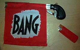 Pistolet comique censé dérouler un drapeau avec « BANG » écrit dessus, à la place de la détonation attendue.